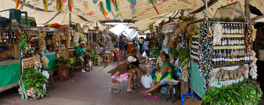 Una de las áreas del mercado Ver-o-Peso de Belém do Pará, Brasil.